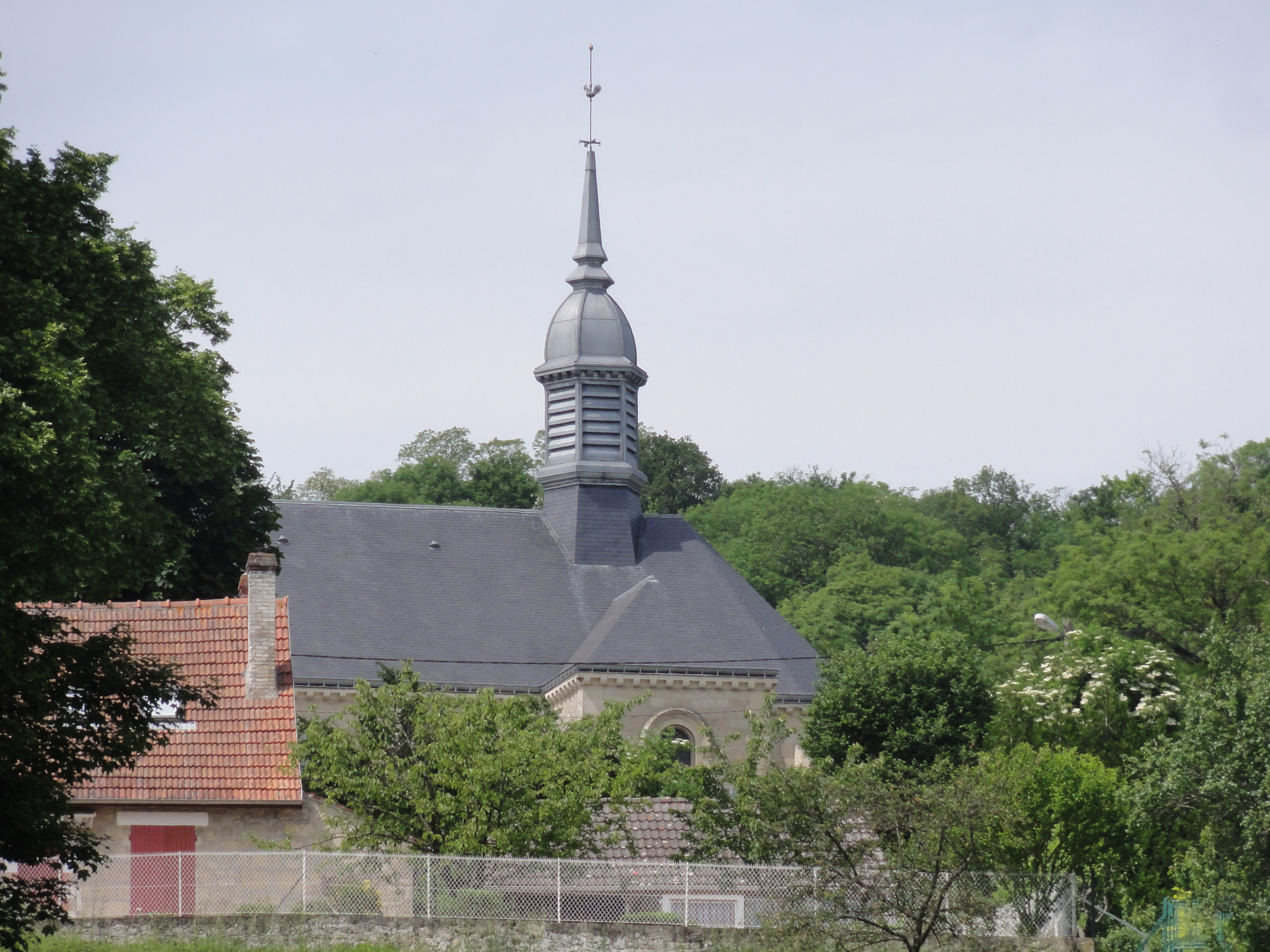 Chavonne (Aisne) Église